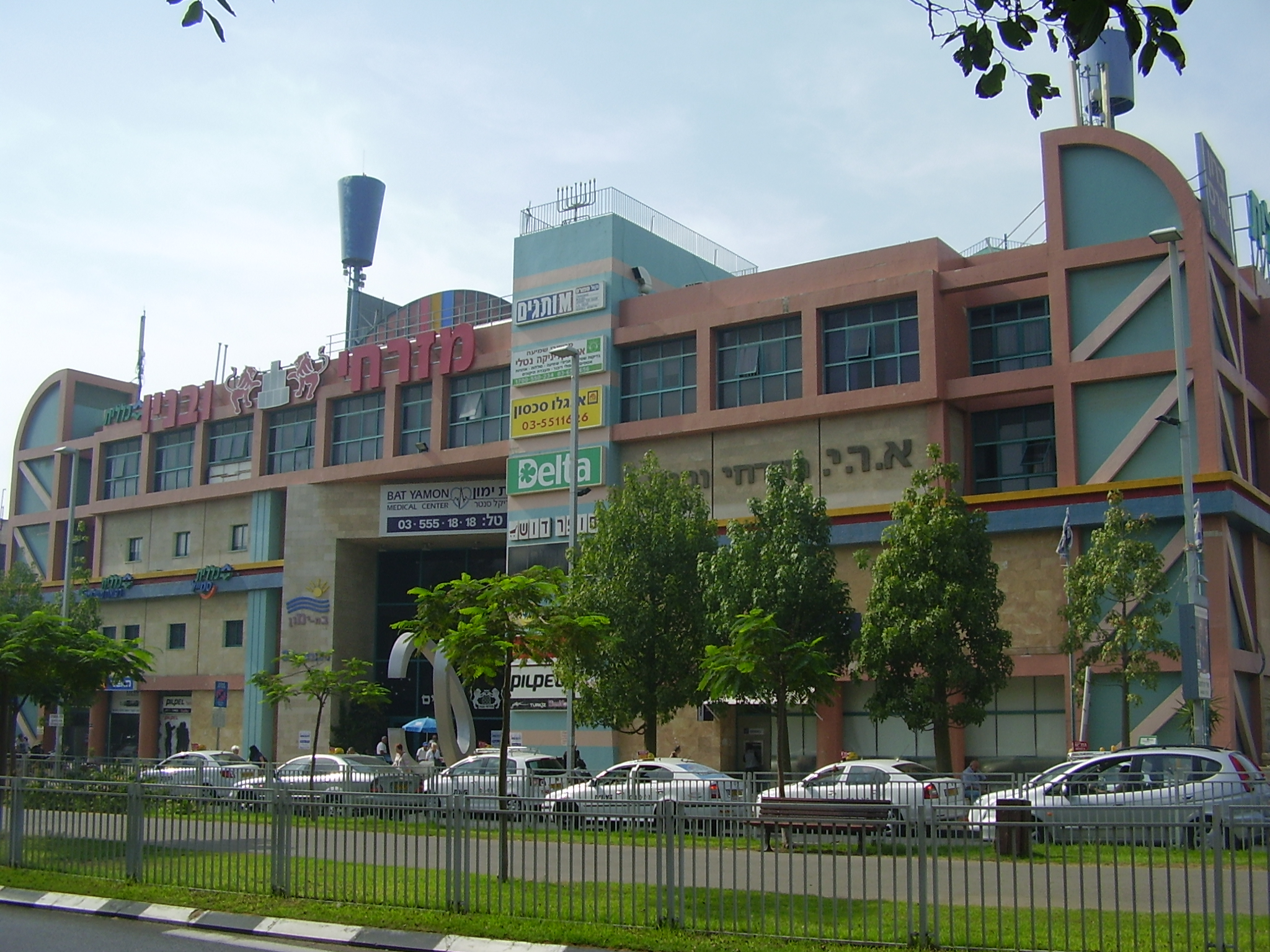 קניון בת ימון בבת ים